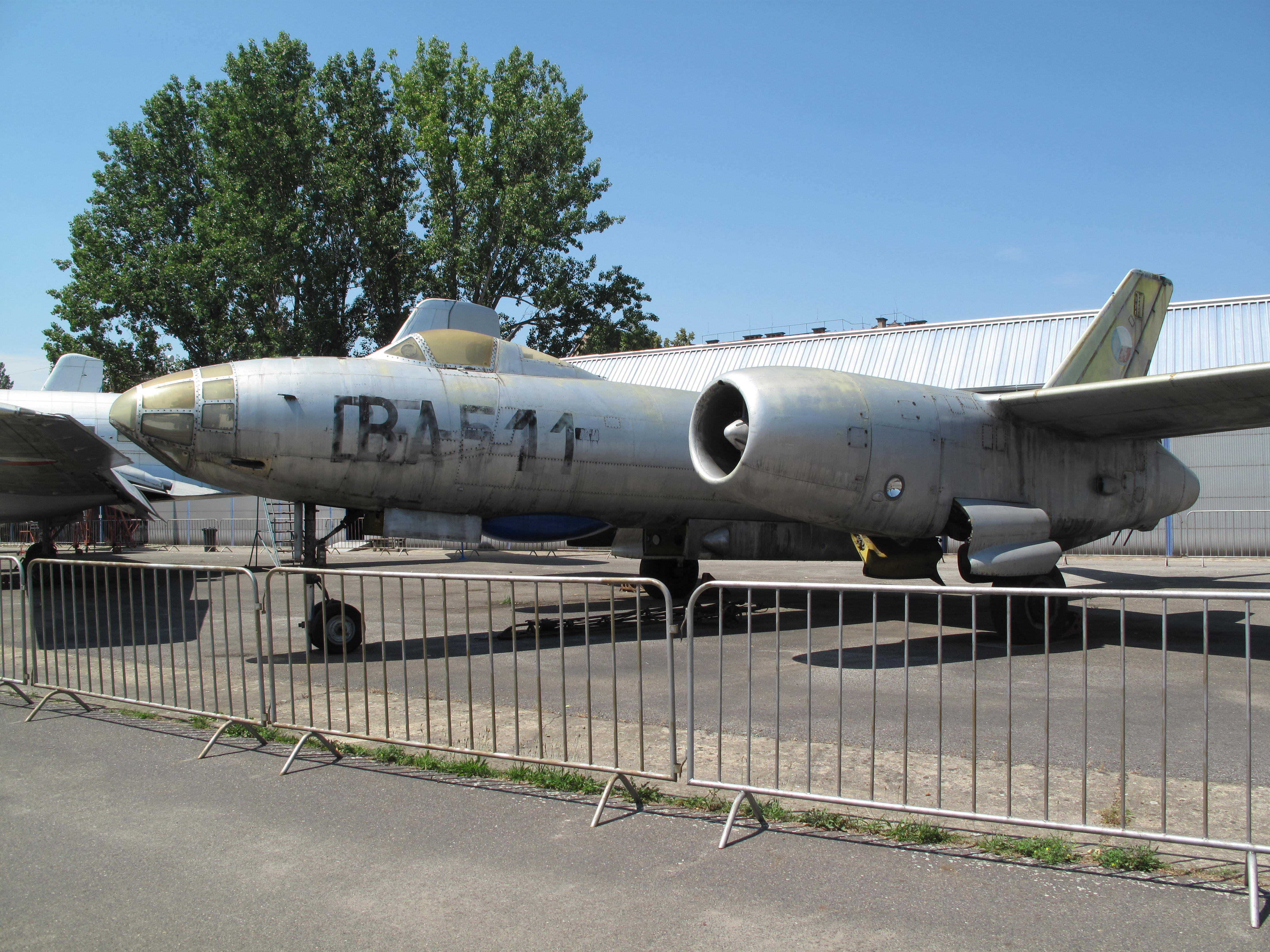 Letecké muzeum Kbely